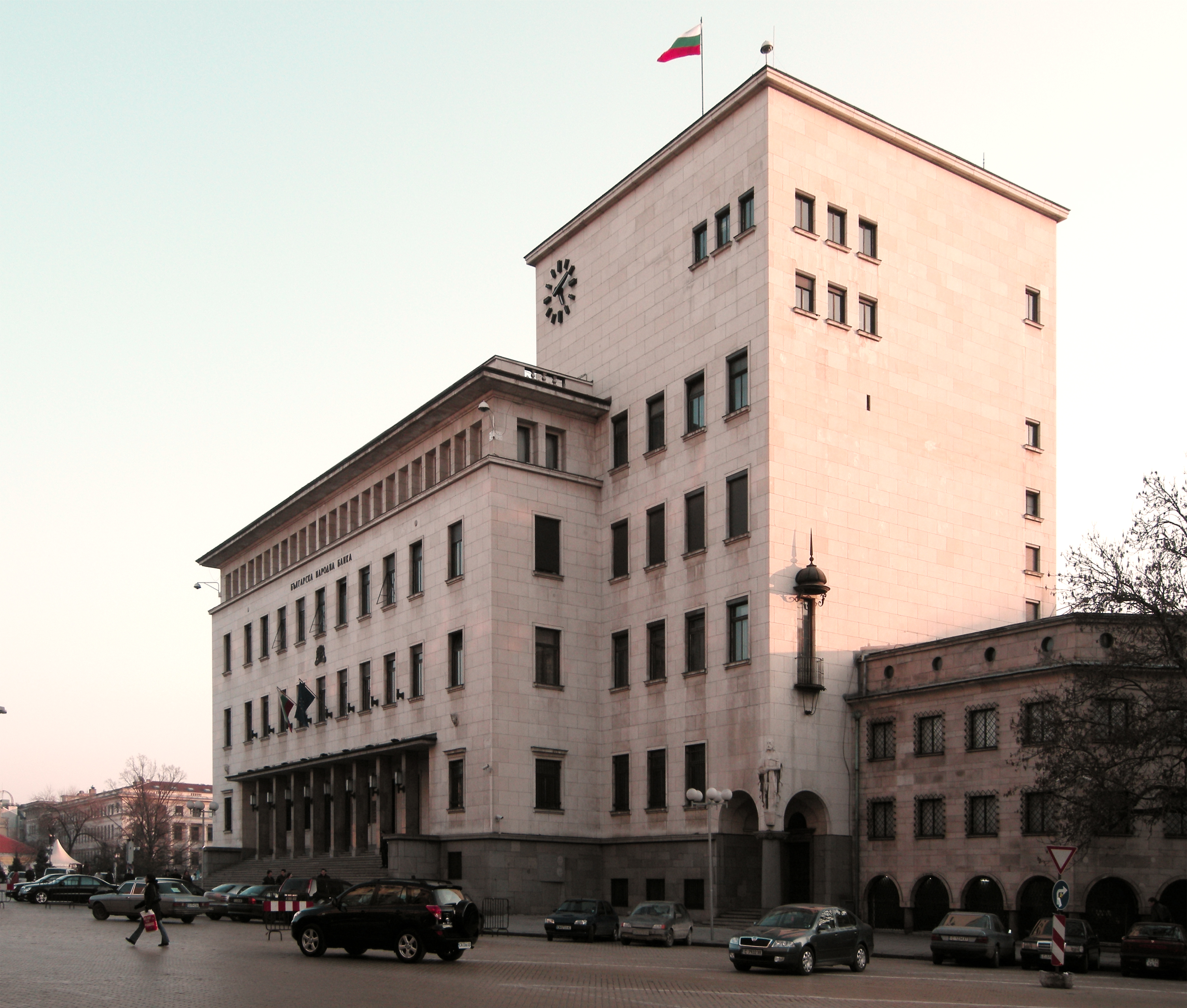 Сградата на Българската Народна Банка; The building of the National Bank of Bulgaria